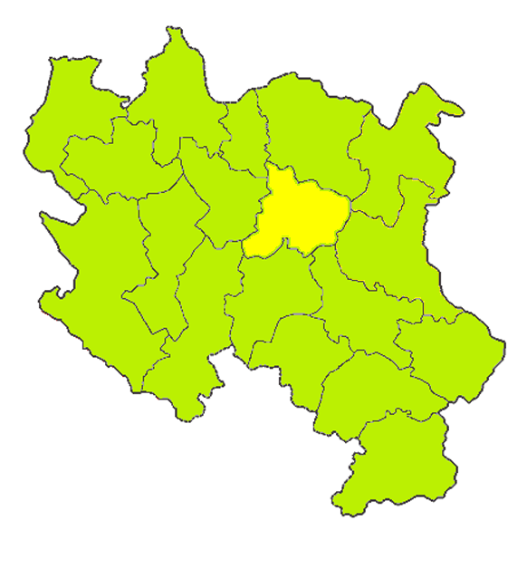 Map of Pomoravlje